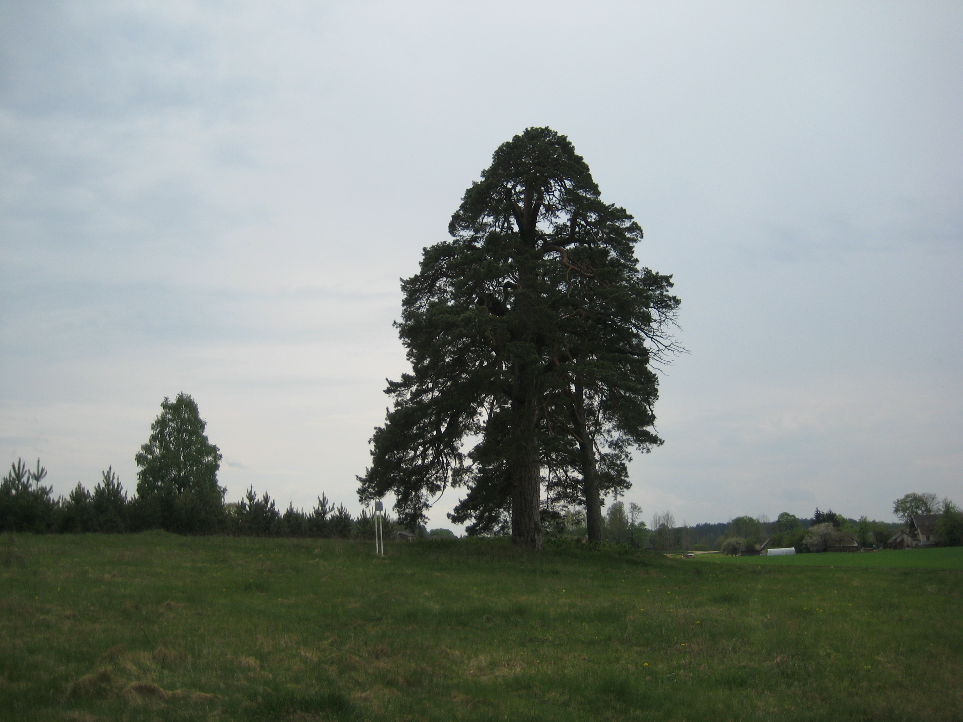 Rokėnai, Lithuania